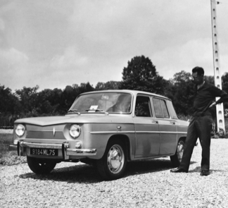 R8 - Ph. Charbonneaux - 1962